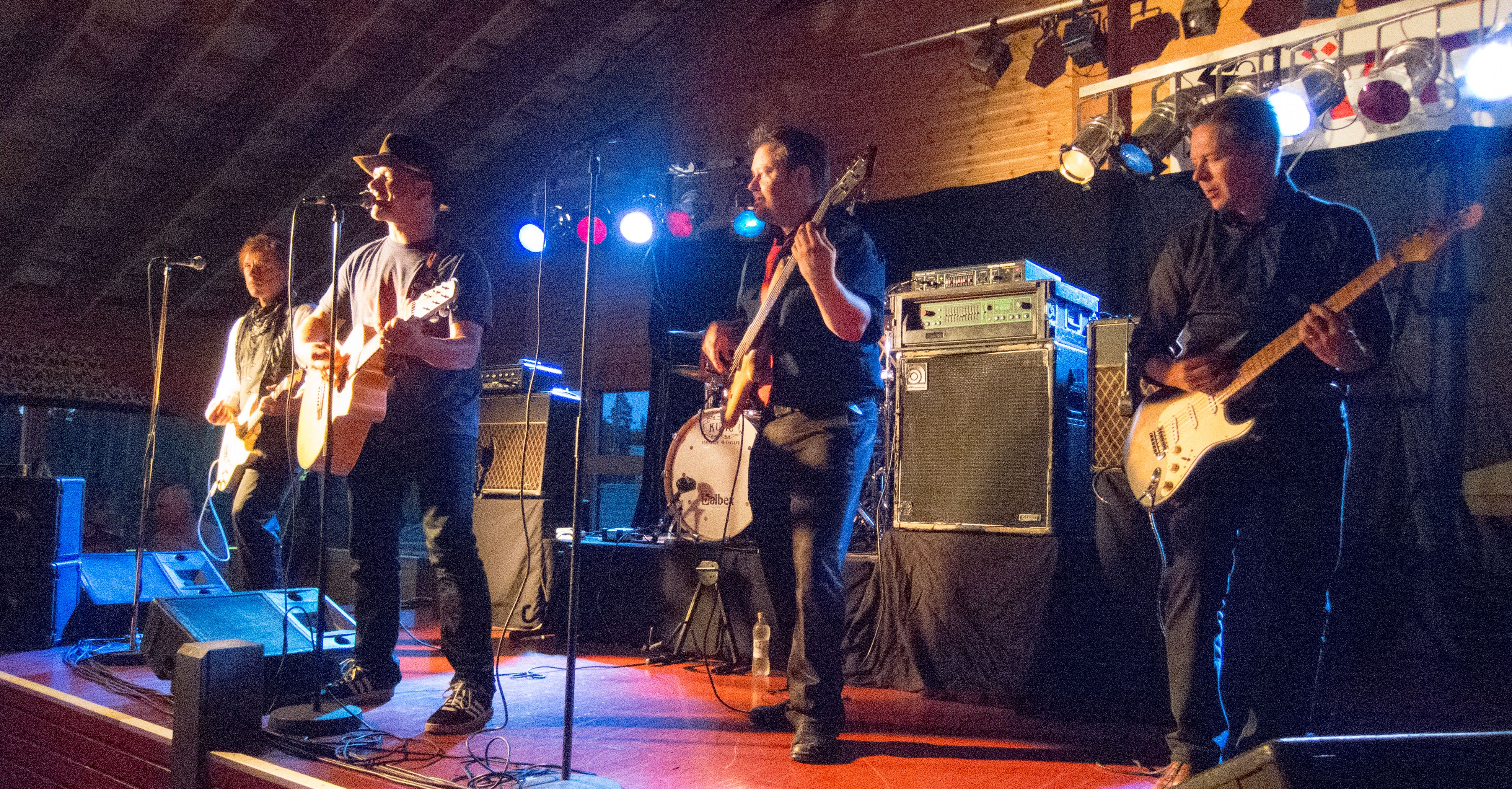 A. Aallon rytmiorkesteri